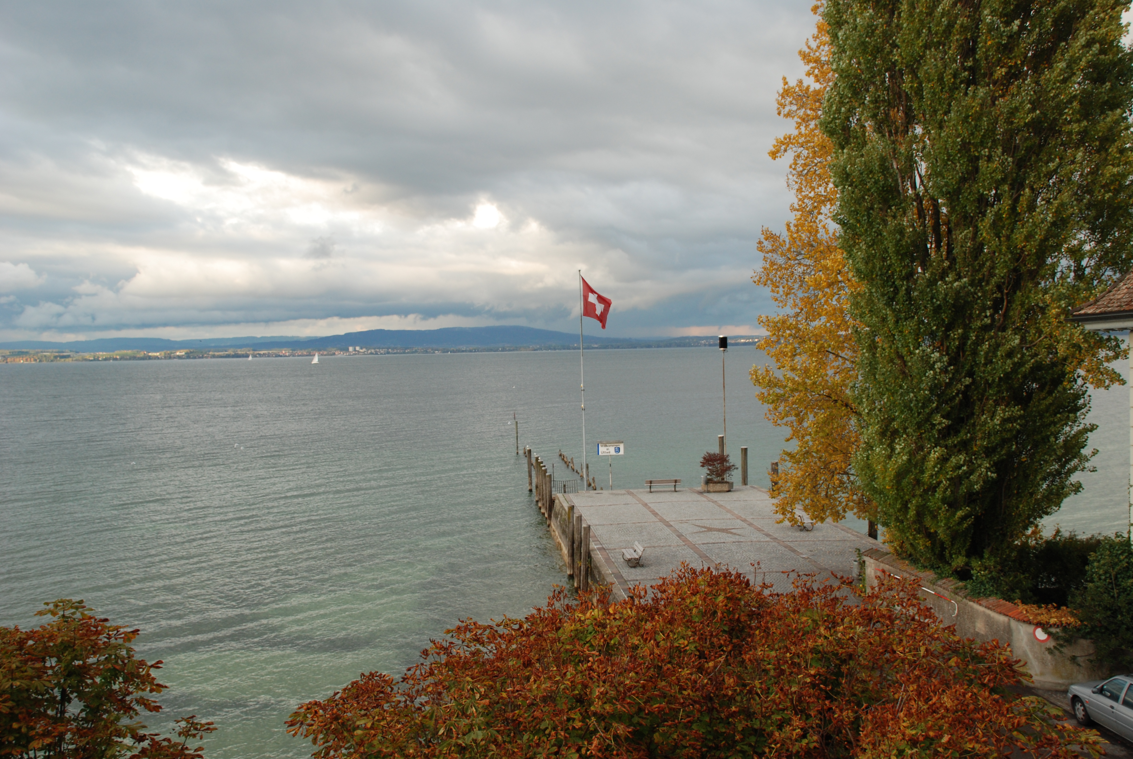 Blick auf den Damm von Uttwil